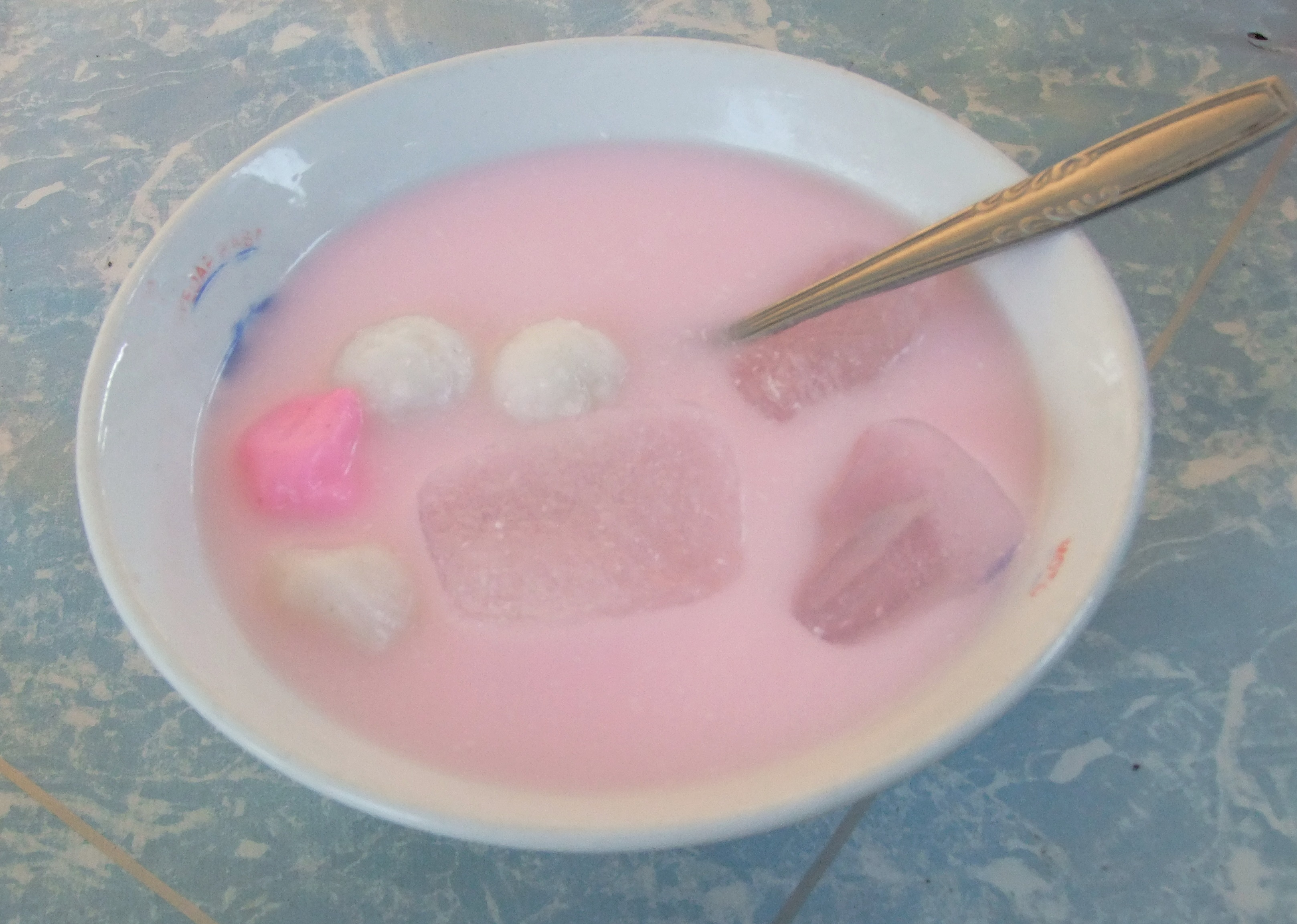 Es gempol, Pusat Wisata Kuliner Jepara